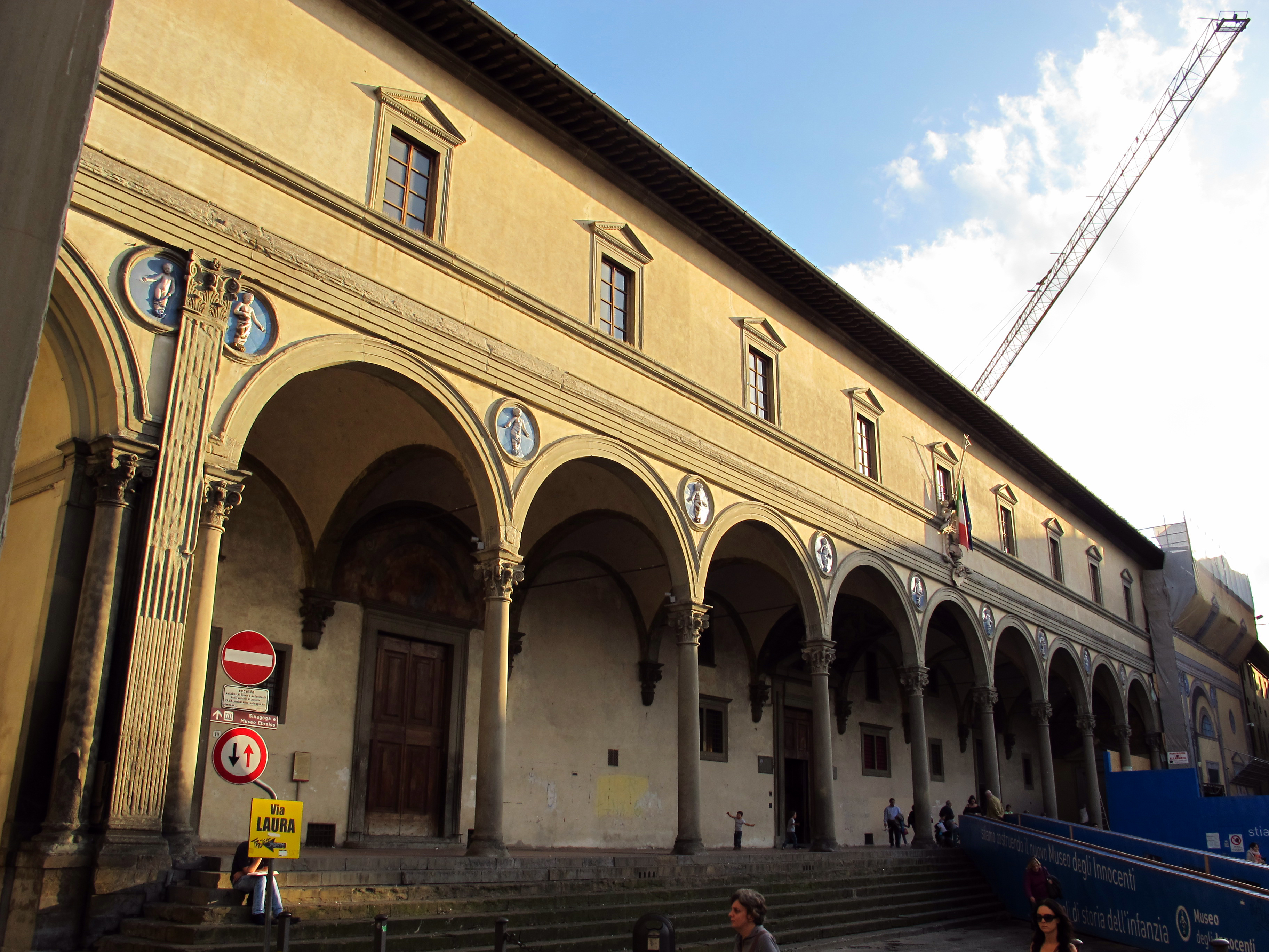 Firenze